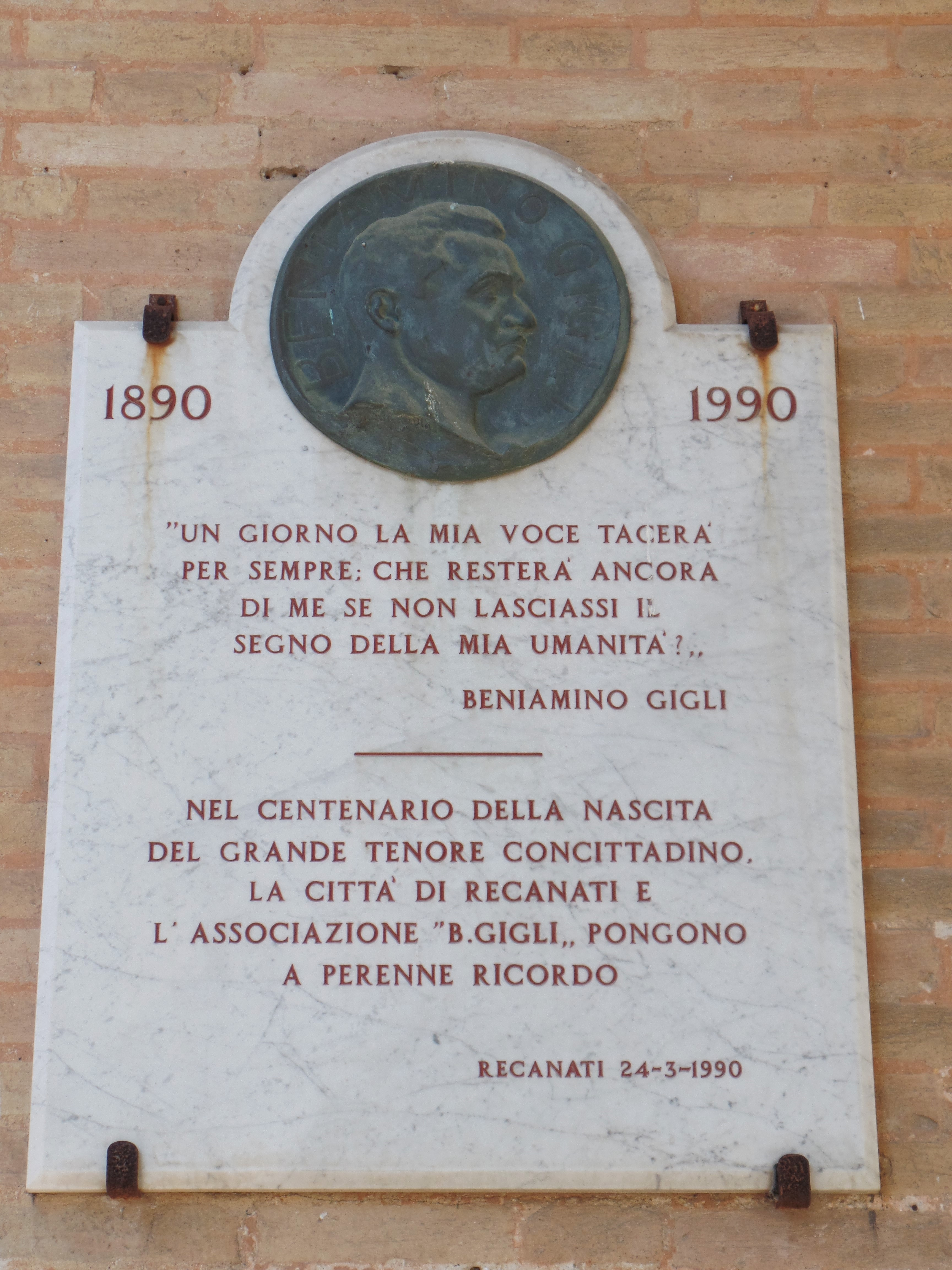 Beniamino Gigli targa e parole a Recanati